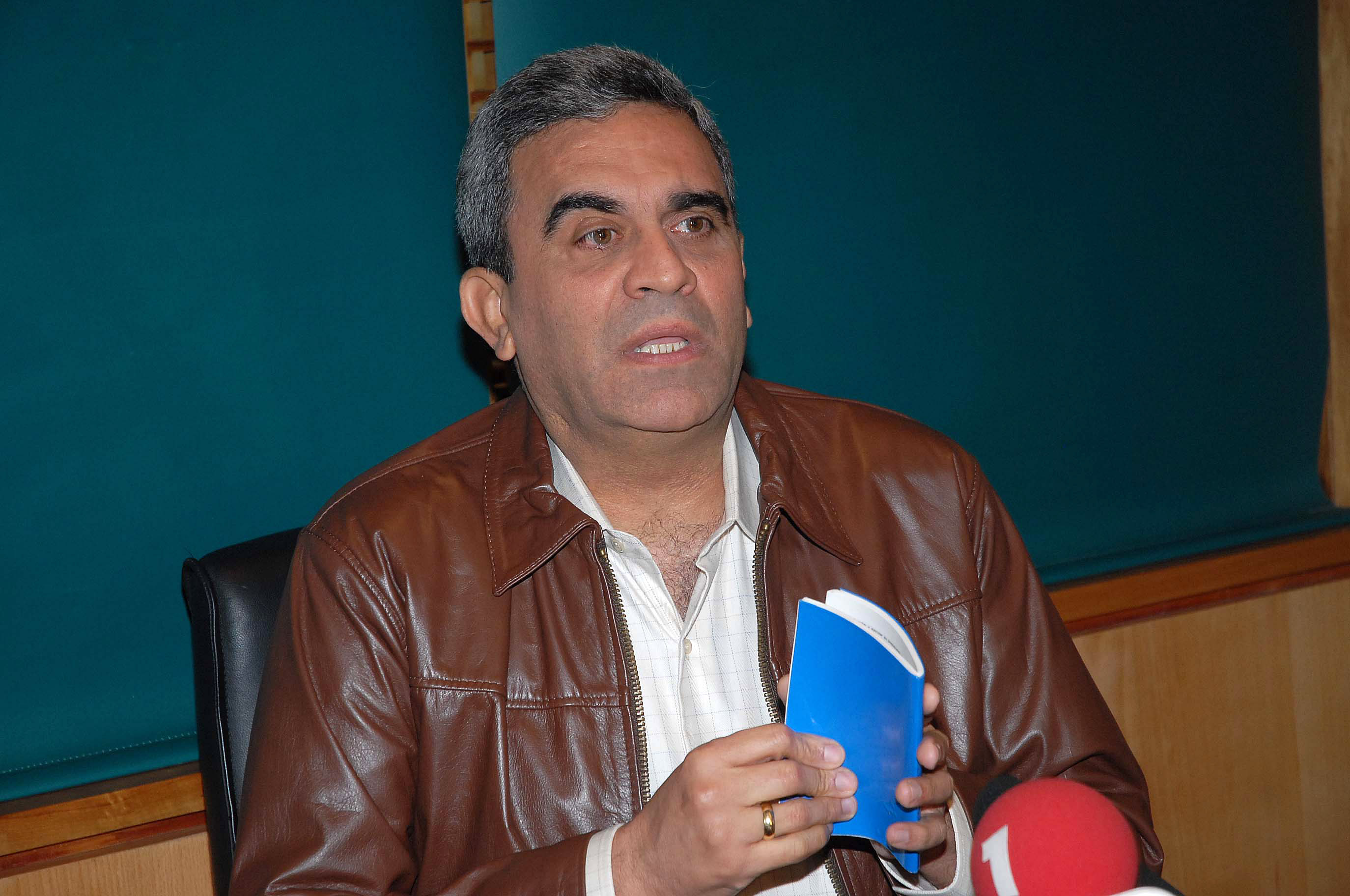 Raúl Isaías Baduel, ex-ministro de Hugo Chavéz